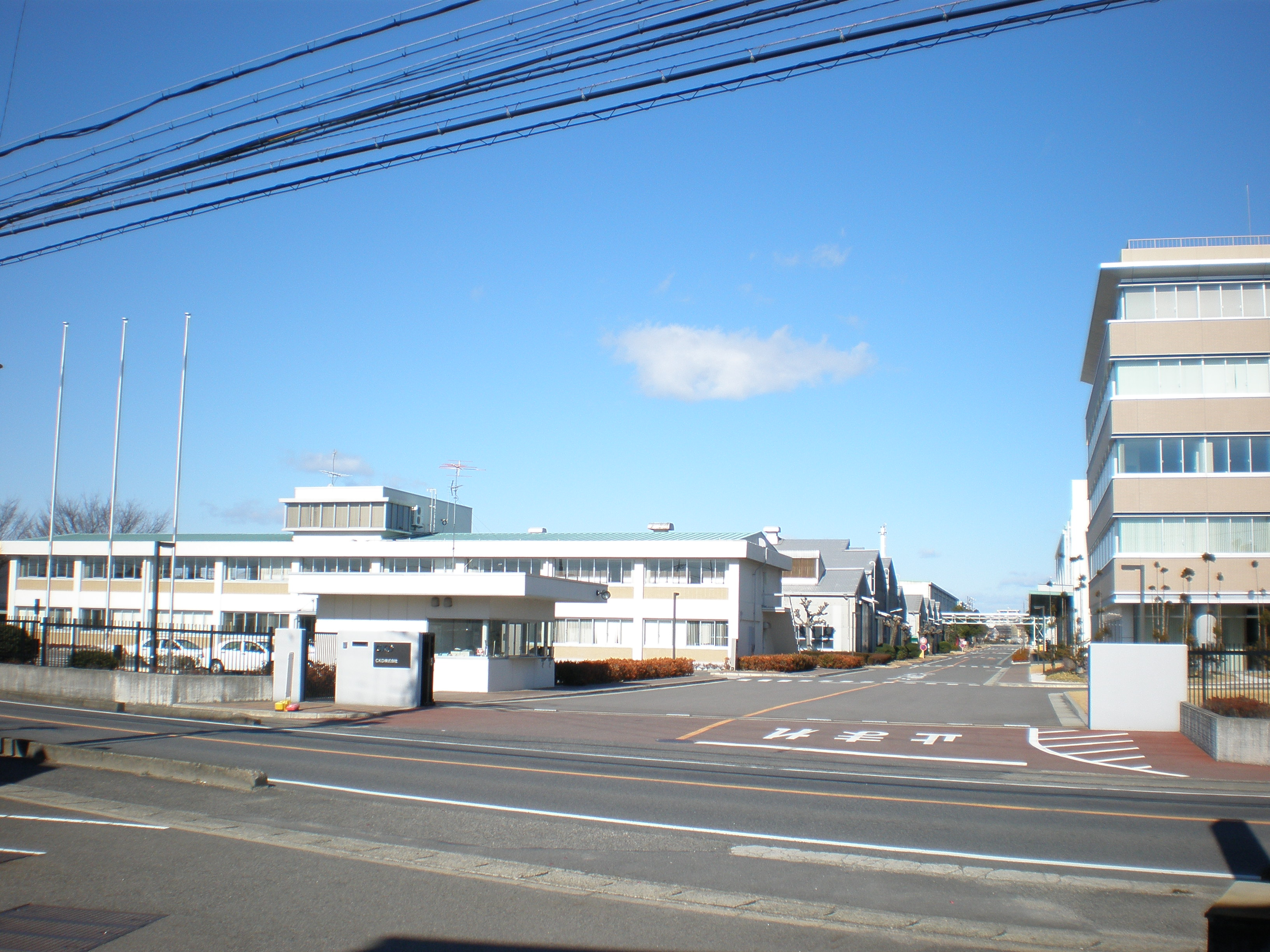 愛知県小牧市にあるCKD本社工場